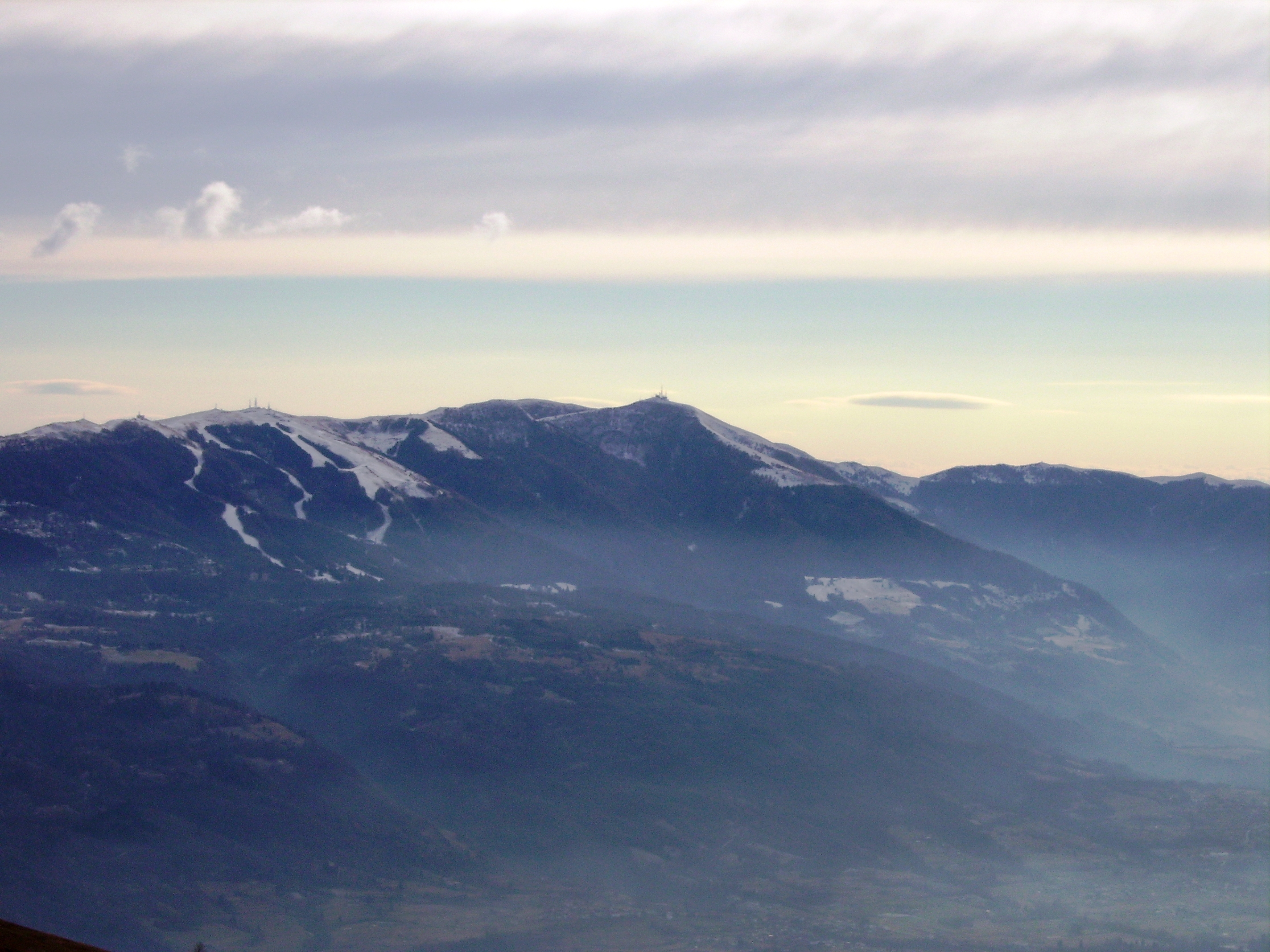 Il Nevegal visto dal monte Serva